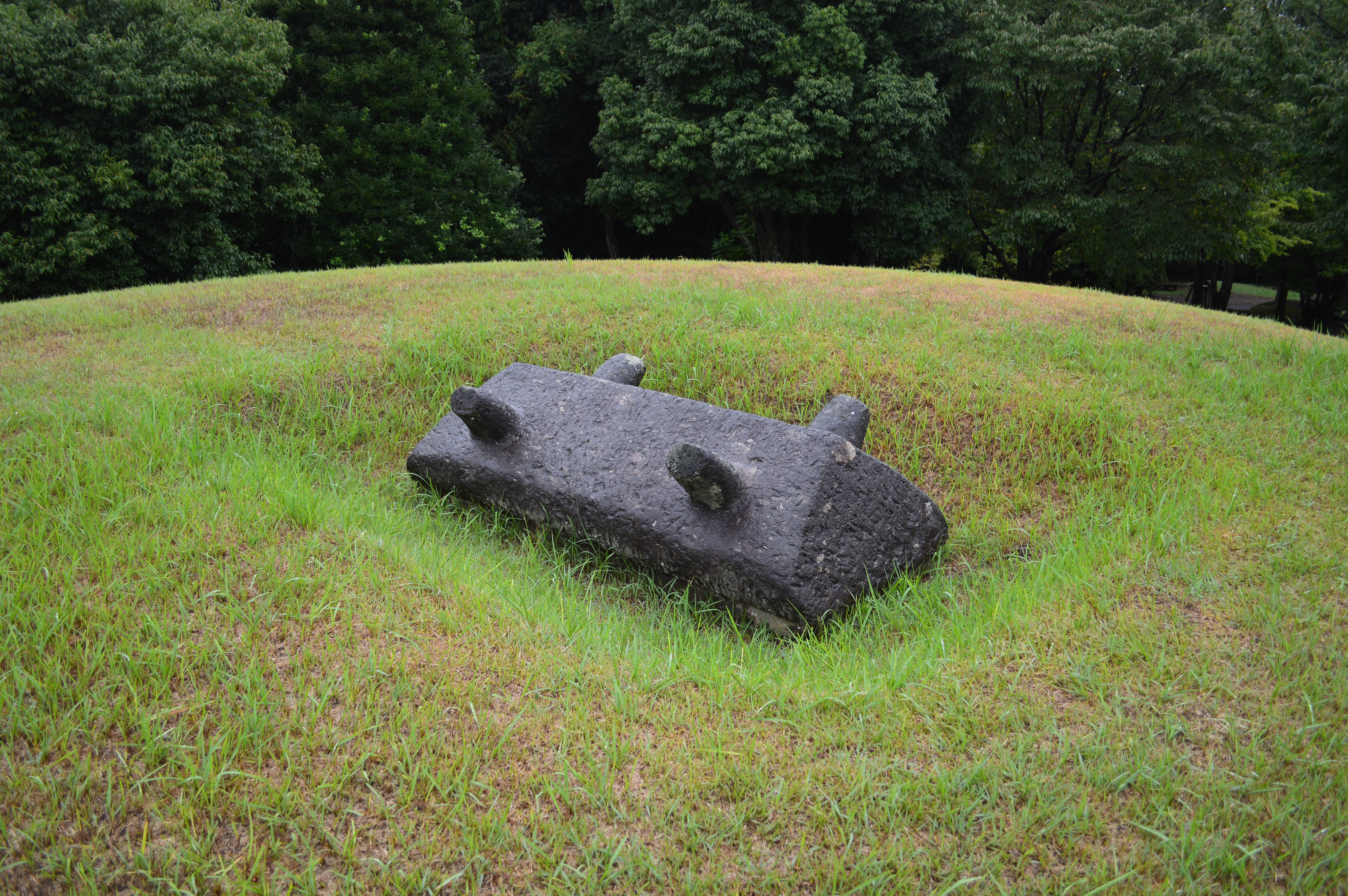 亀塚古墳 (大分市) 小亀塚古墳 石棺のレプリカ